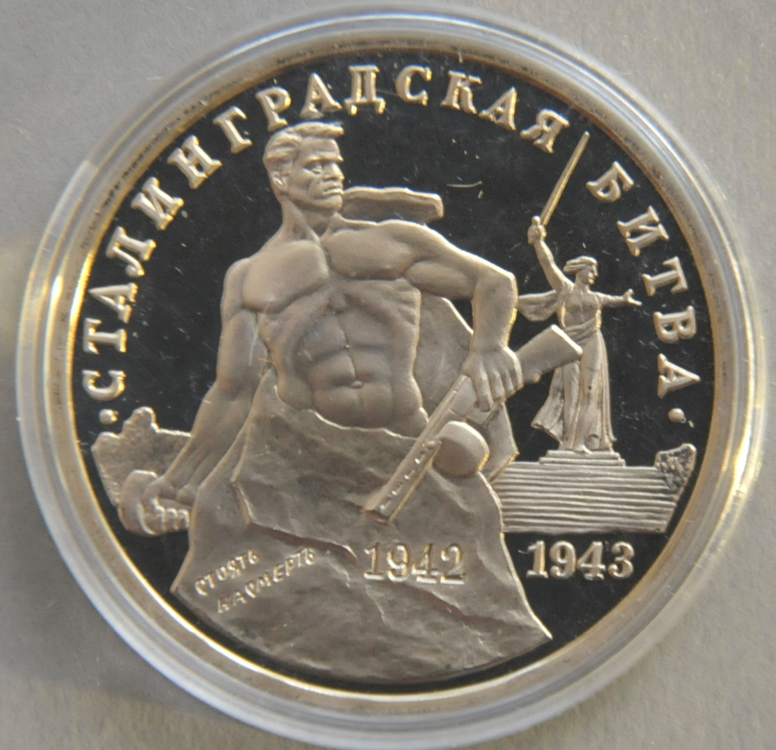 Russische Münzen zum Gedenken des 50. Jahrestags des Endes der Schlacht um Stalingrad